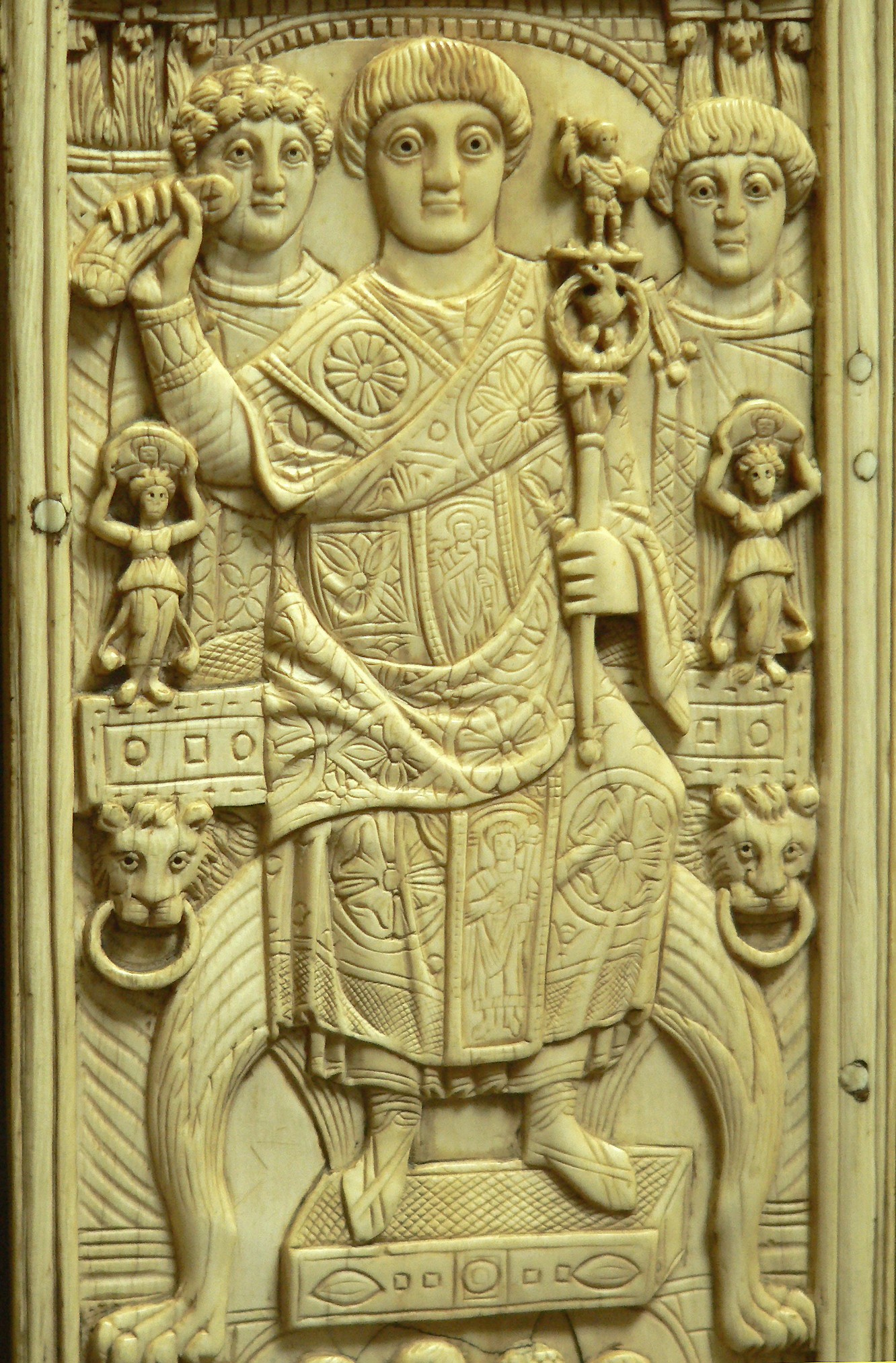 Feuillet d'un diptyque. Le consul Areobindus présidant les jeux, Constantinople, 506